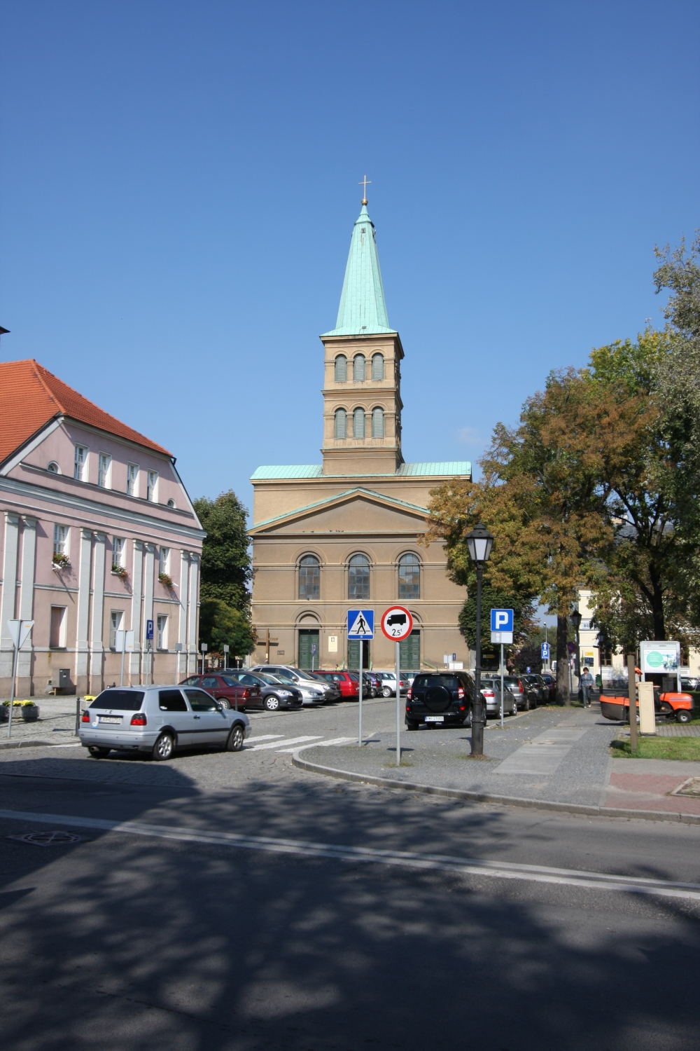 Międzyrzecz, kościół ewangelicki. ob. rzym.-kat. fil. p.w. św. Wojciecha, mur., 1834